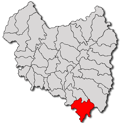 Categorie:Hărţi ale judeţului Covasna